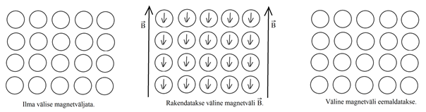 Diamagneetilise materjali magnetdomeenid reageerimas välisele magnetväljale.